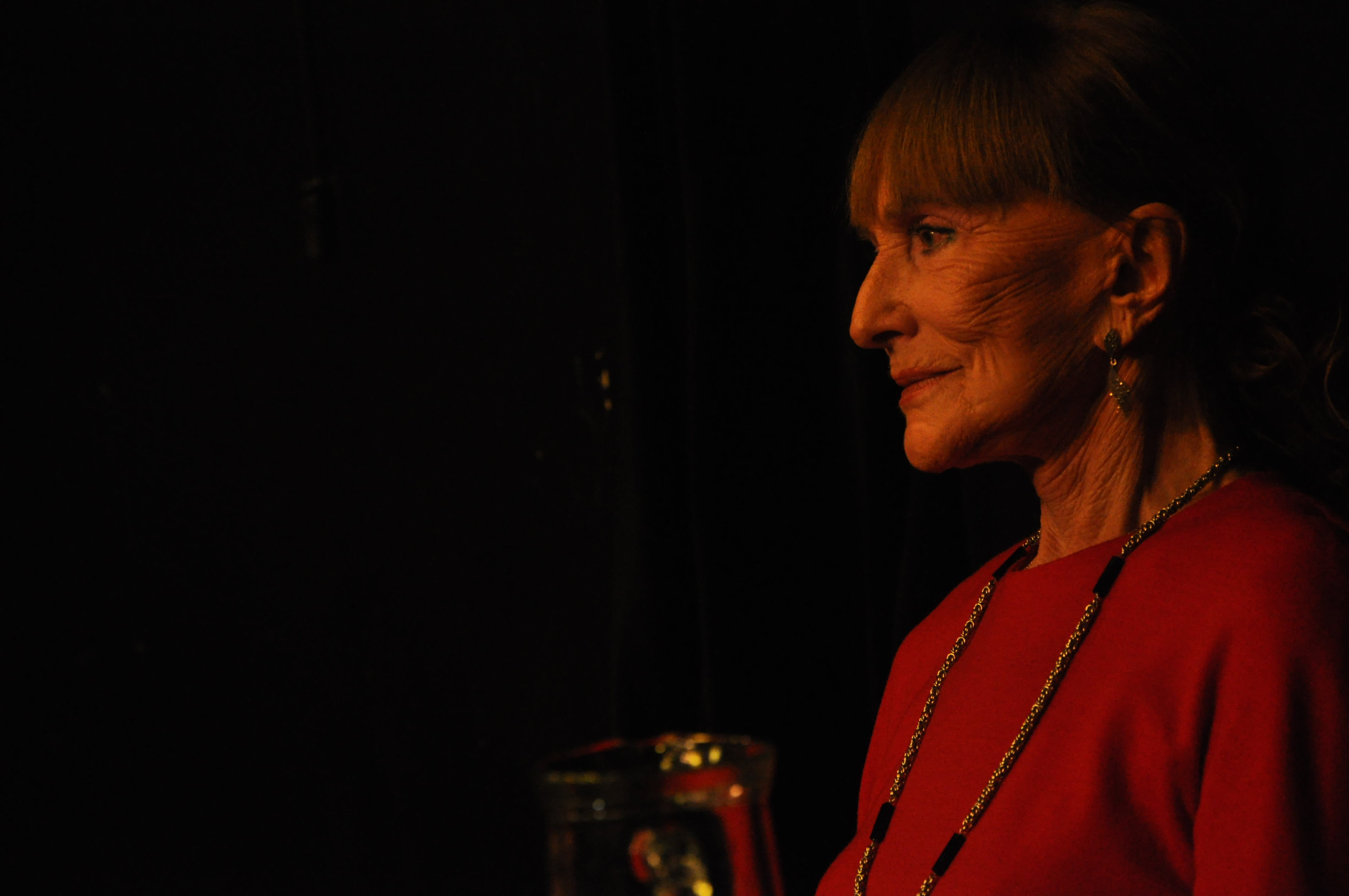 Beseda s paní Soňou Červenou. Festival Moje 20. století, Brno, 27. listopadu 2012.